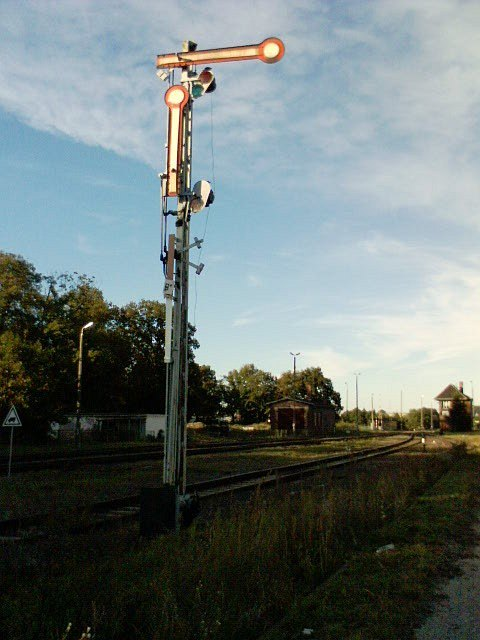 Semafor kształtowy na stacji w Trzciance (Polska).